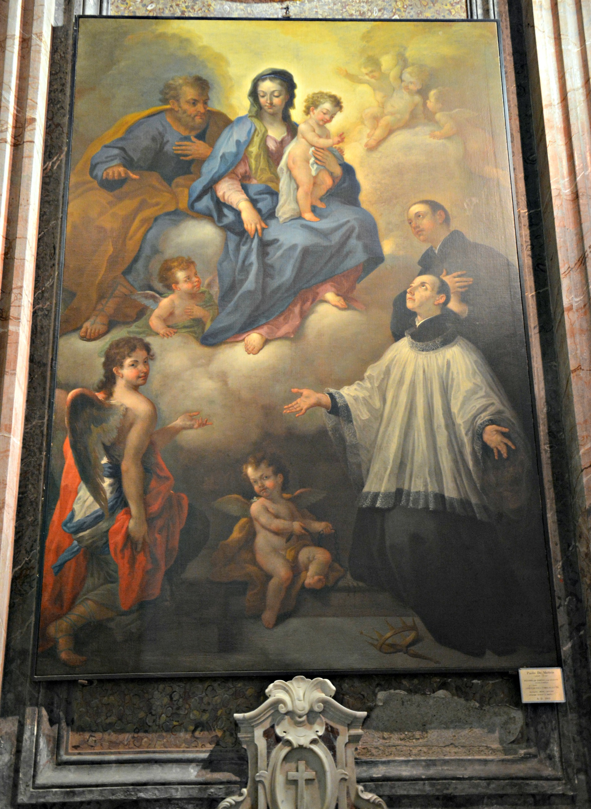 Vedi titolo